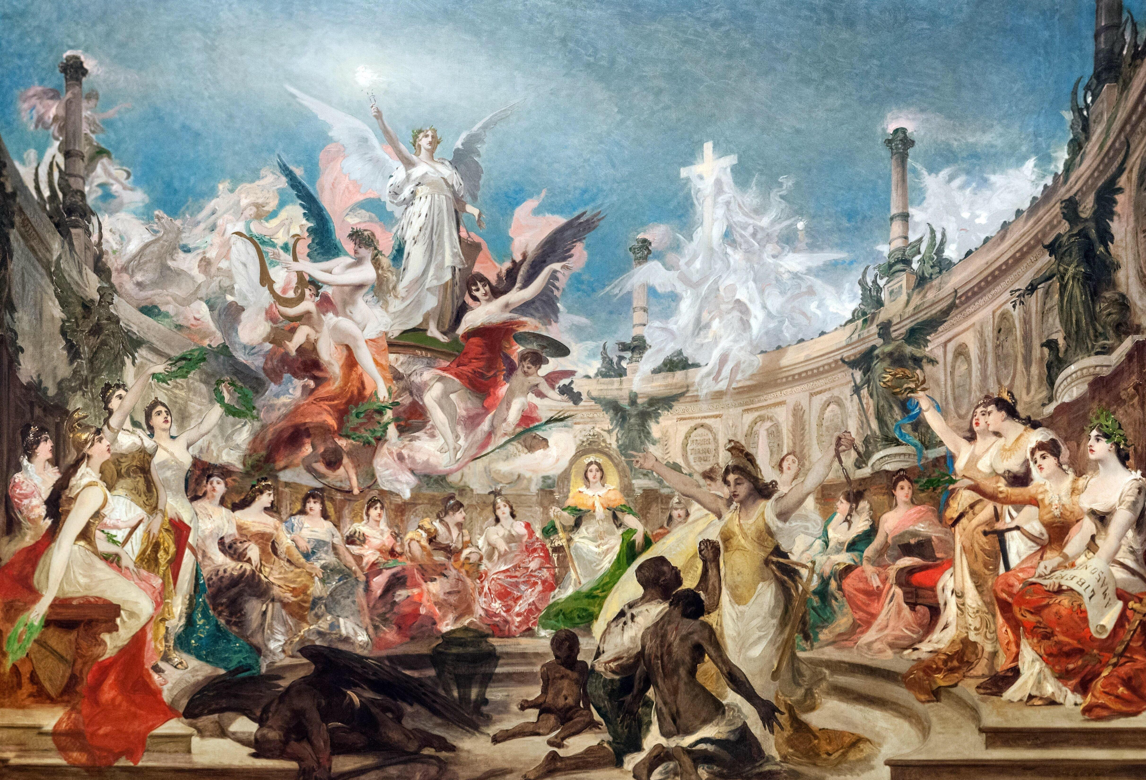 Libertação dos Escravos (estudo) (óleo sobre tela; 140,5 x 200 cm)